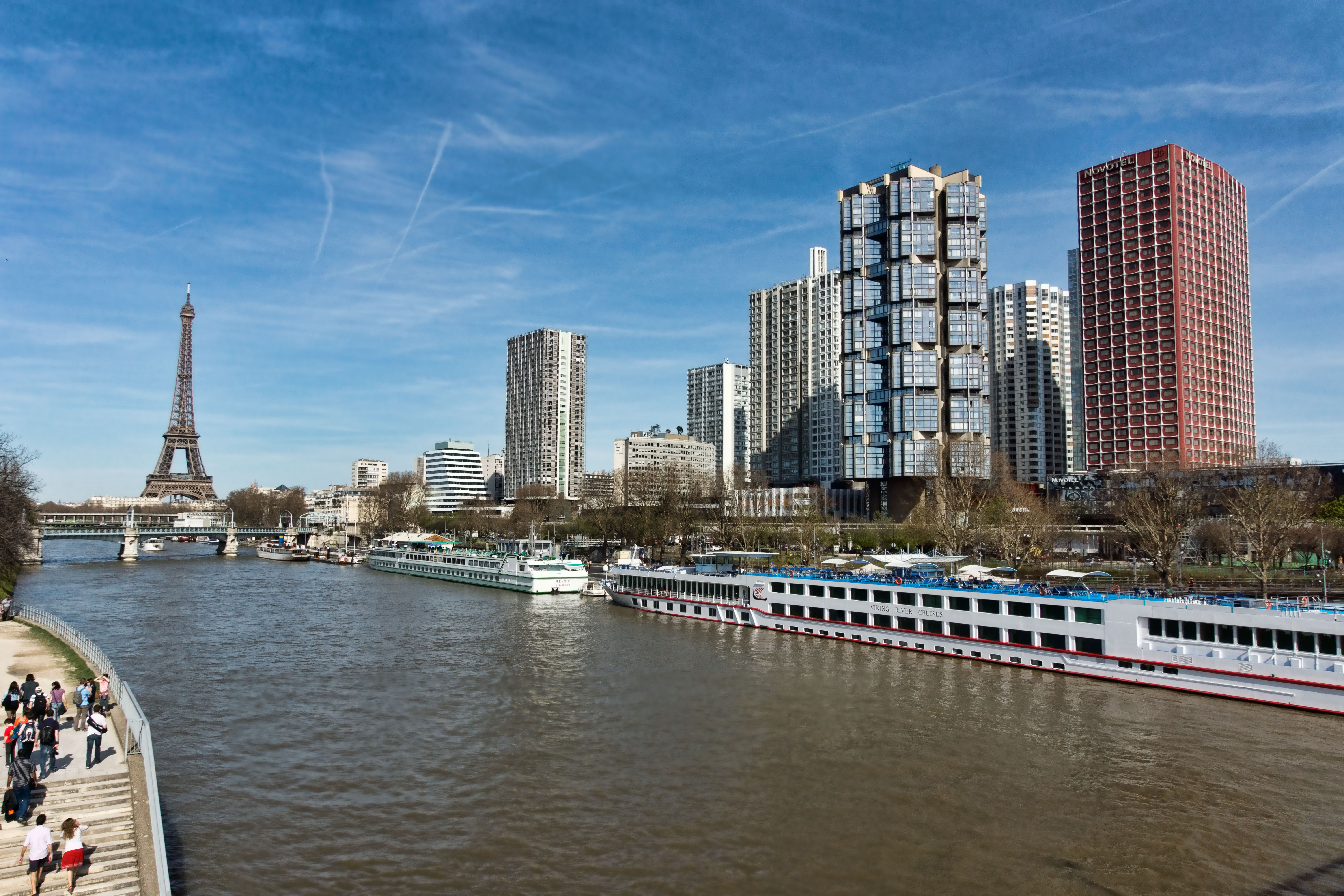 Front de Seine, vu de la réplique de la statue de la Liberté